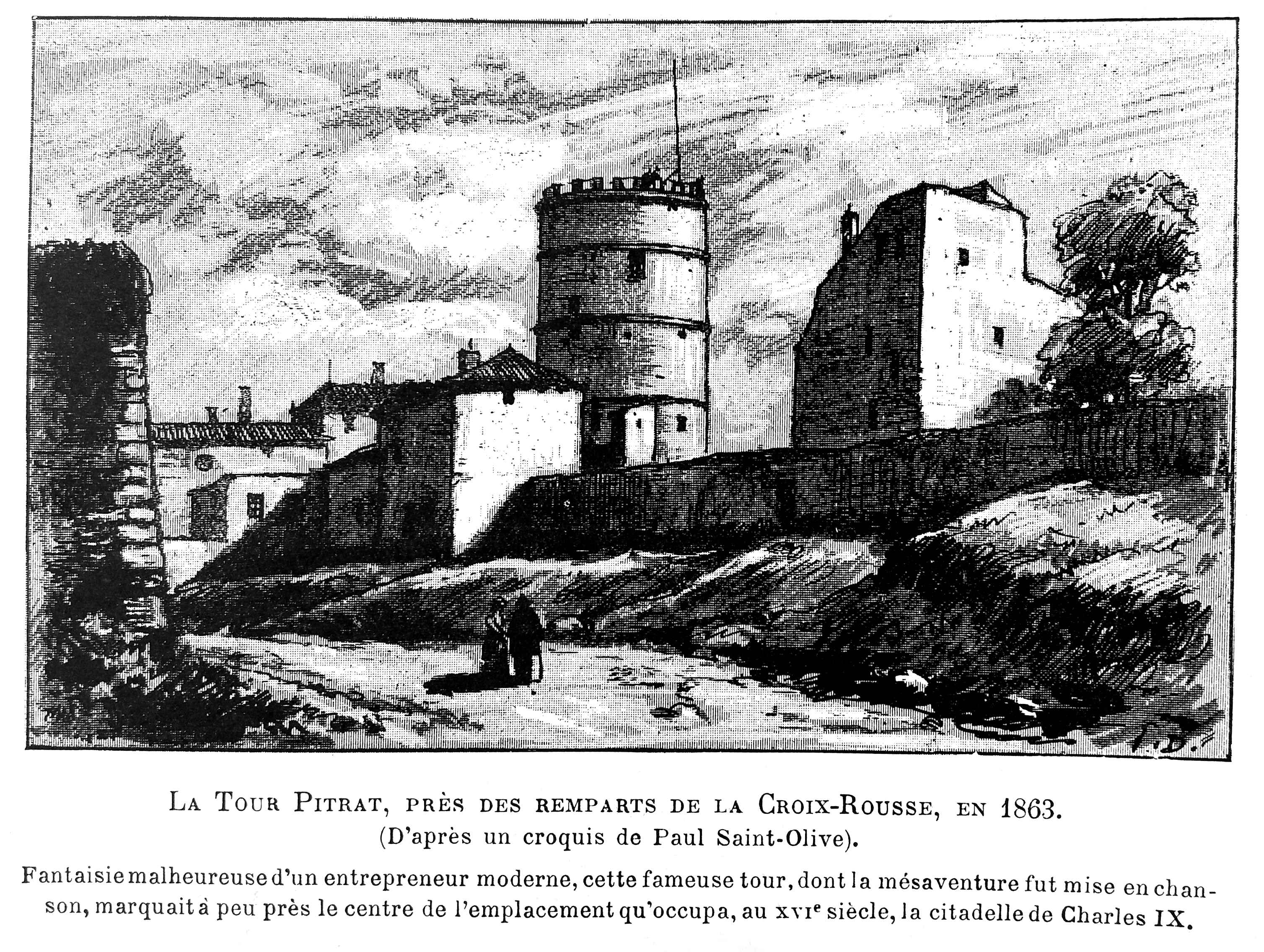 Livre Le Lyon de nos pères, Emmanuel Vingtrinier et Joannès Drevet, 1901, page 322 (dessin de Joannès Dreve) : la tour Pitrat, près des remparts de la Croix-Rousse, en 1863. (D'après un croquis de Paul Saint-Olive). Bibliothèque municipale de Lyon.